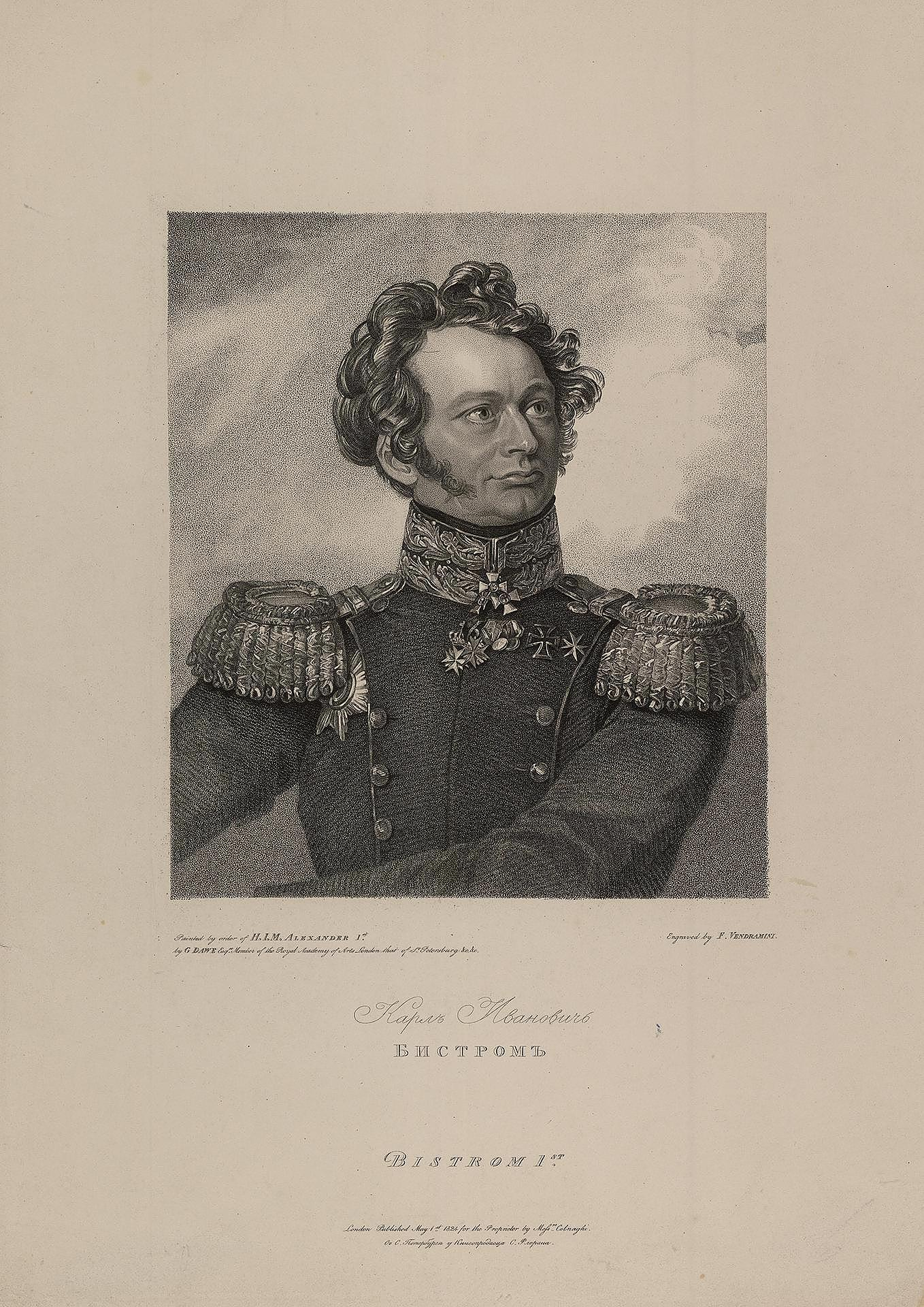 Портрет генерала К.И. Бистрома, гравюра по оригиналу Д. Доу